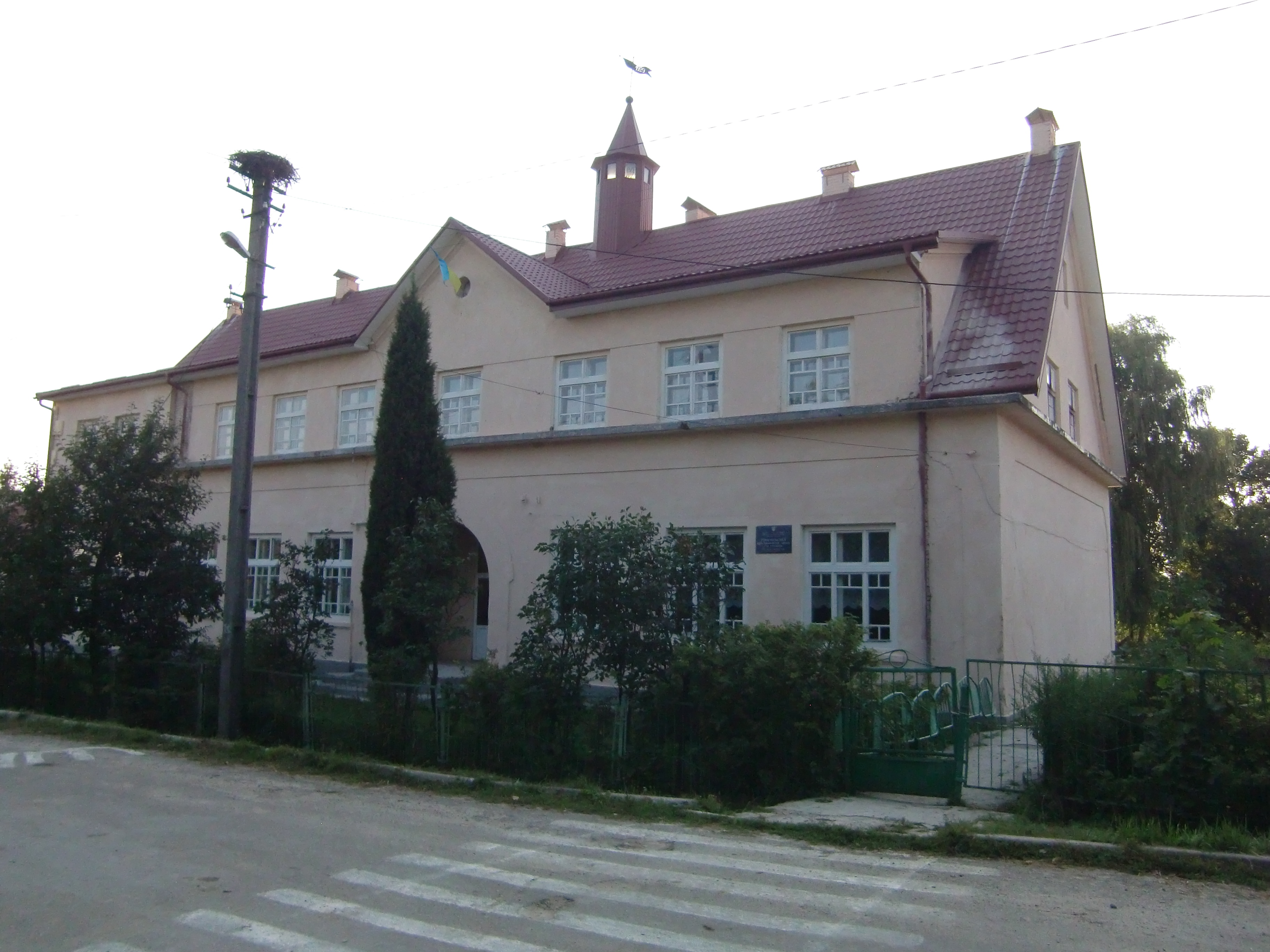 Schulhaus